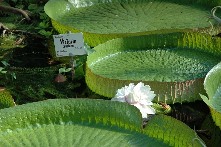 Victoria cruziana im Alten Botanischen Garten, Göttingen